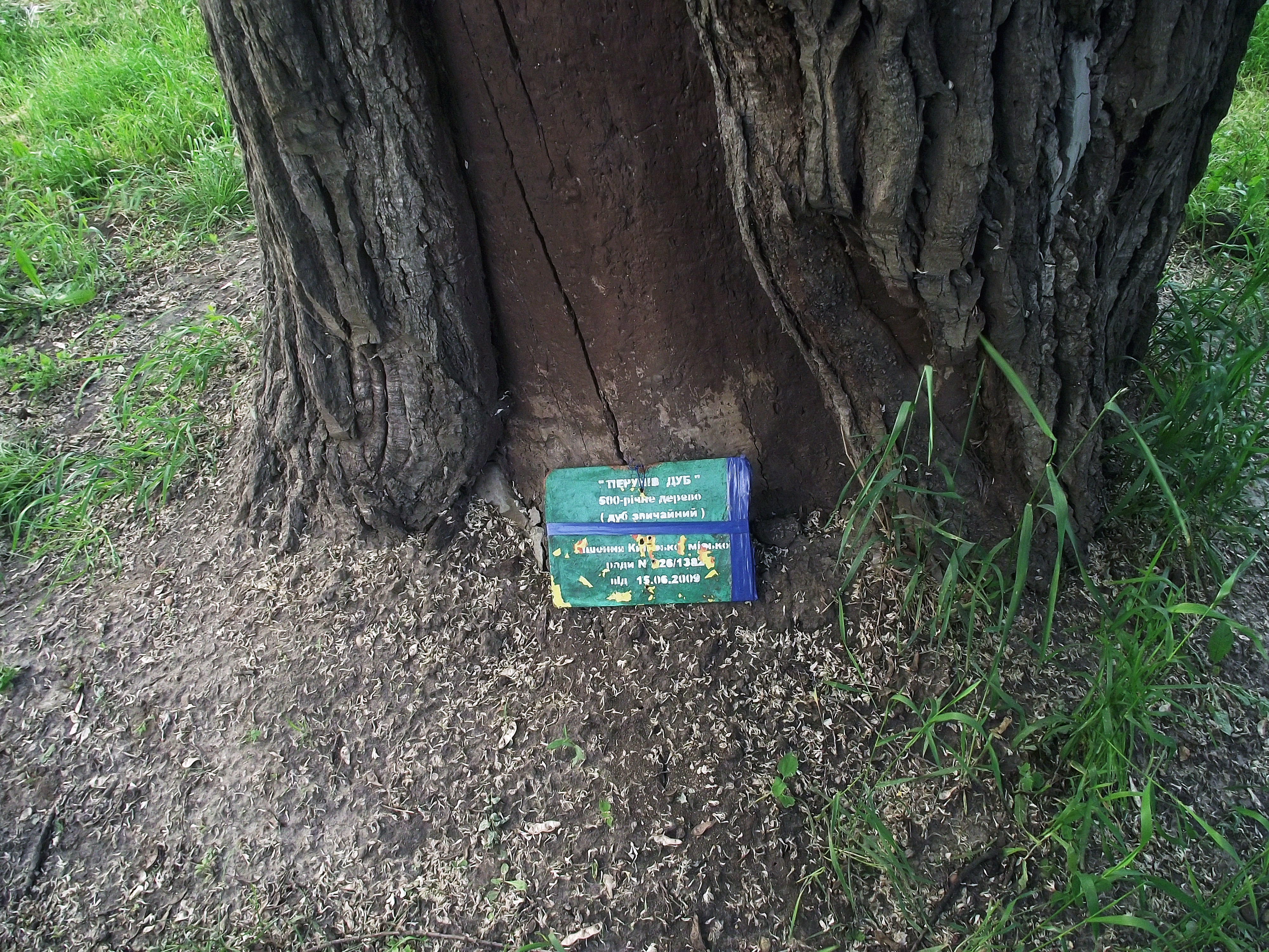 Близько 400 років. Обсяг 4,6 м. Висота 15 м.